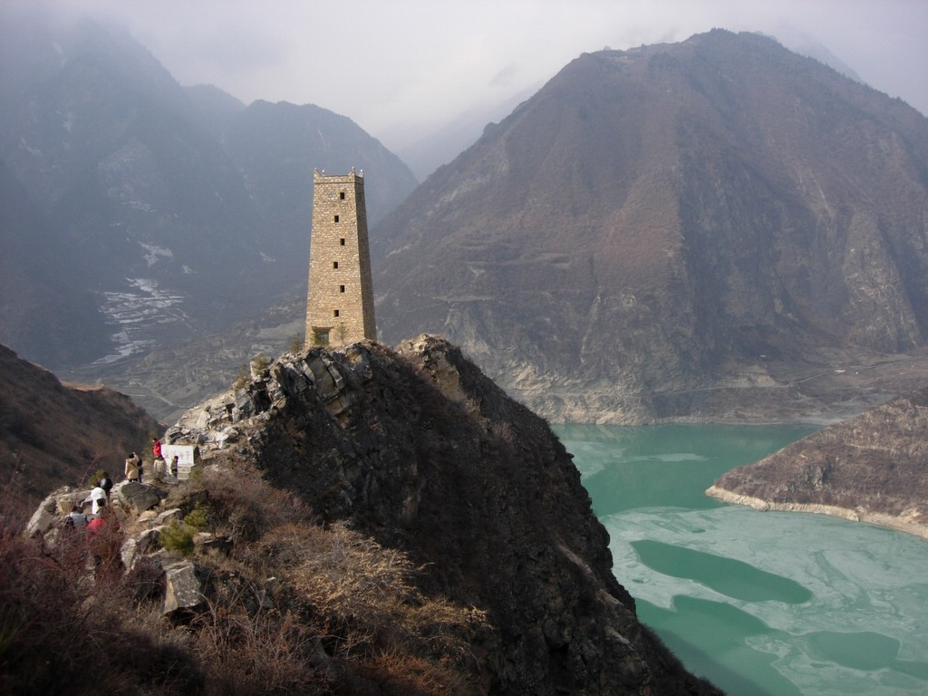 Overlap brook lake pillbox 叠海碉楼 photo by Memes